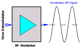 Signalverlauf Superheterodyne NF-Verstaerker